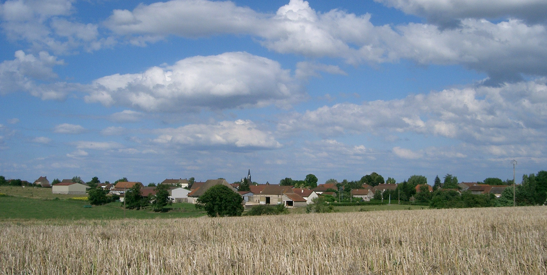 Village de Chivres (Côte d'Or) - vue d'ensemble du village